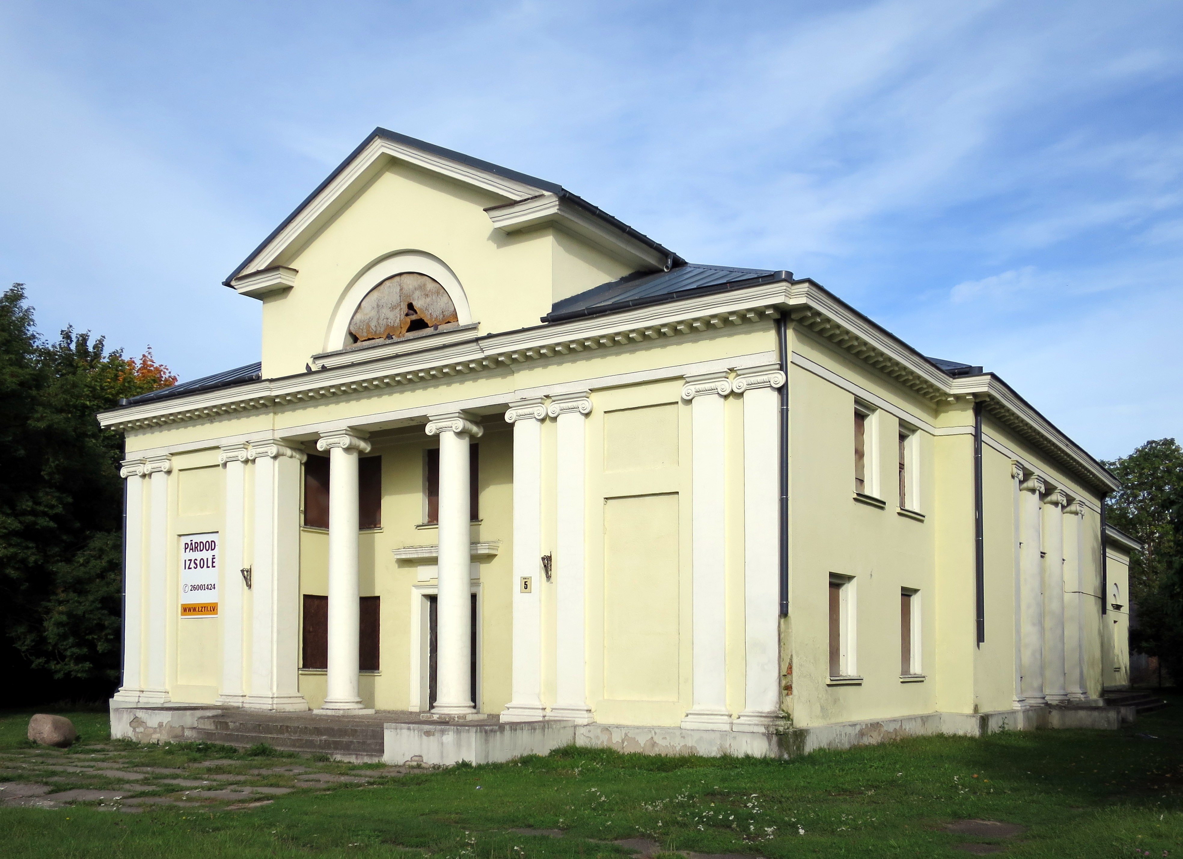 Kinoteātris, Bauska, Kalna iela 5